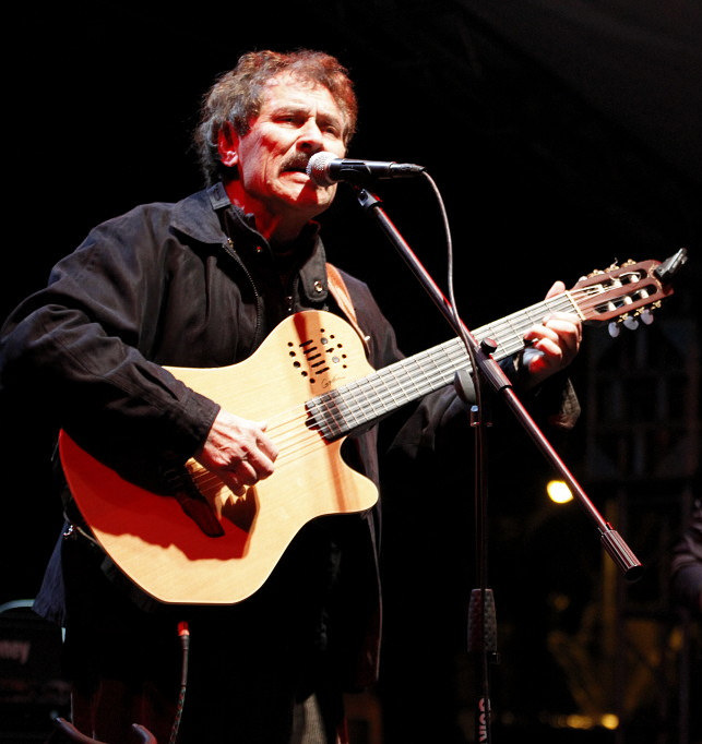 Sauce, Canelones • 19 de junio 2014 • Fotografía: Agustín Fernández